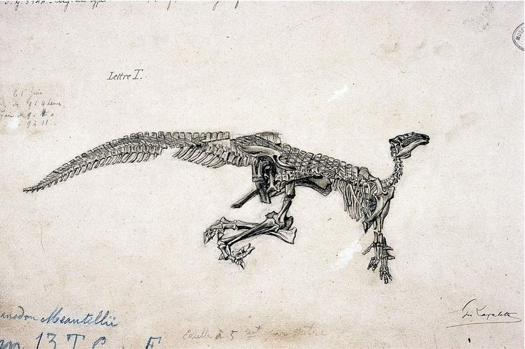 Tekening door Gustave Lavalette van Mantellisaurus atherfieldensis (juli 1882), oorspronkelijk Iguanodon mantelli, zoals het skelet aangetroffen werd in de kleisteen van het Wealden van de "Cran du Midi" te Bernissart.